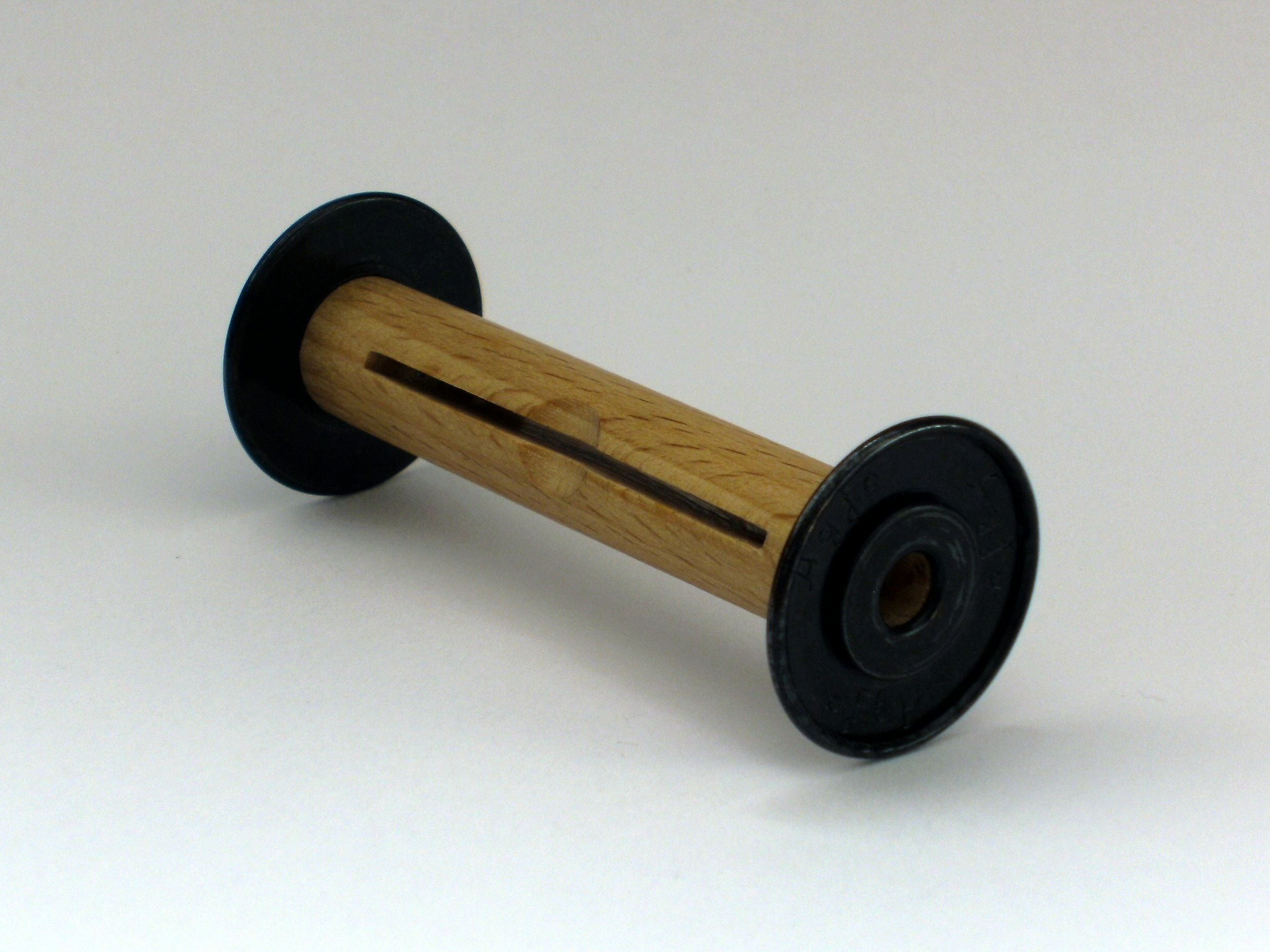 Holz Rollfilmspule 120